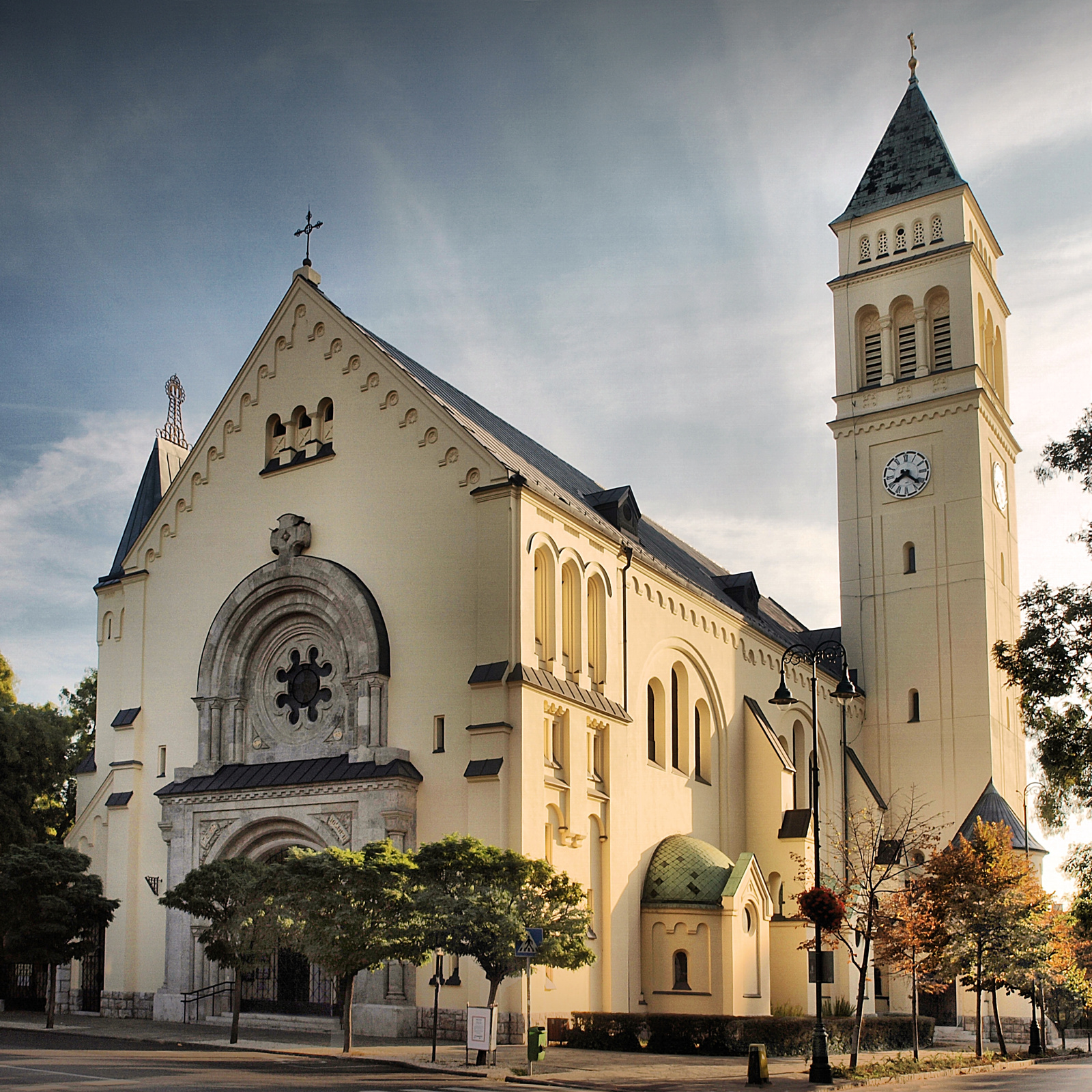 R.k. templom (Budapest 19, Kós Károly tér 16.) This is a photo of a monument in Hungary, Identifier: 1268